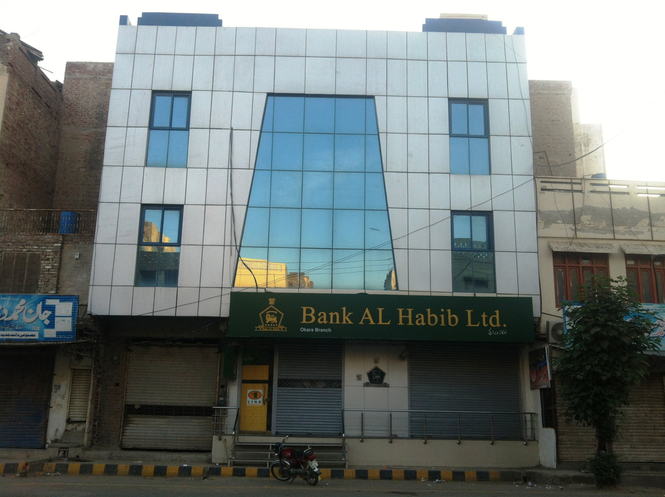 Bank Al Habib Ltd. Okara Branch